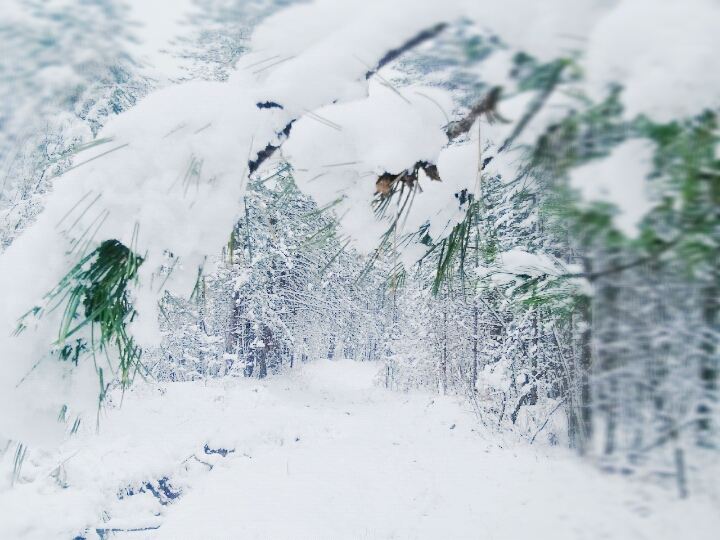 Obronci planine Ozren, 7.4.2015 god. This image was uploaded as part of Trace of Soul 2016.